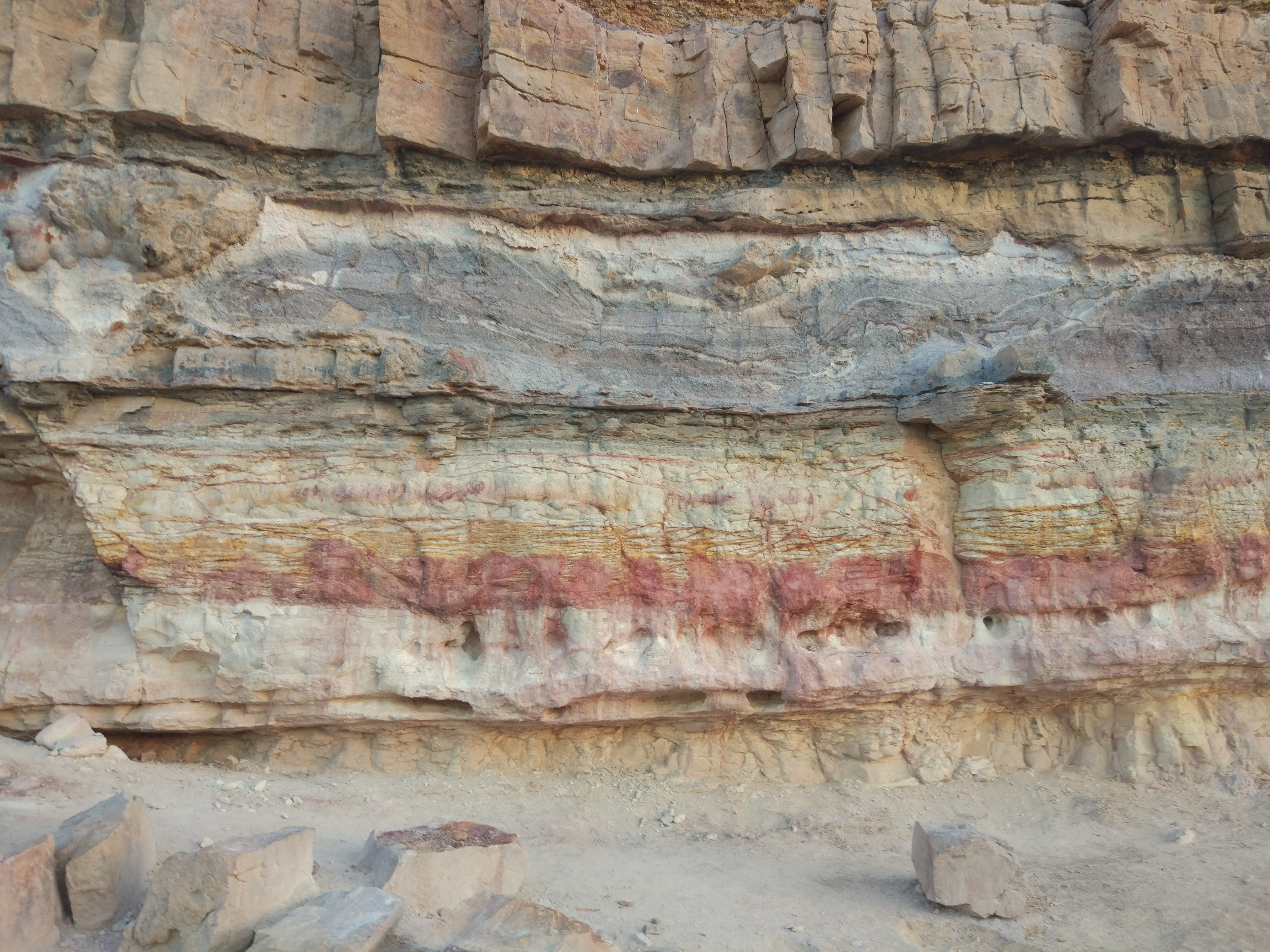 הסיל (שכבה לבנה) בגדת נחל רמון, סמוך לכביש 40. השכבה הסגולה היא אבן חול שנאפתה בזמן חדירת הסיל והפכה לקוורציט.